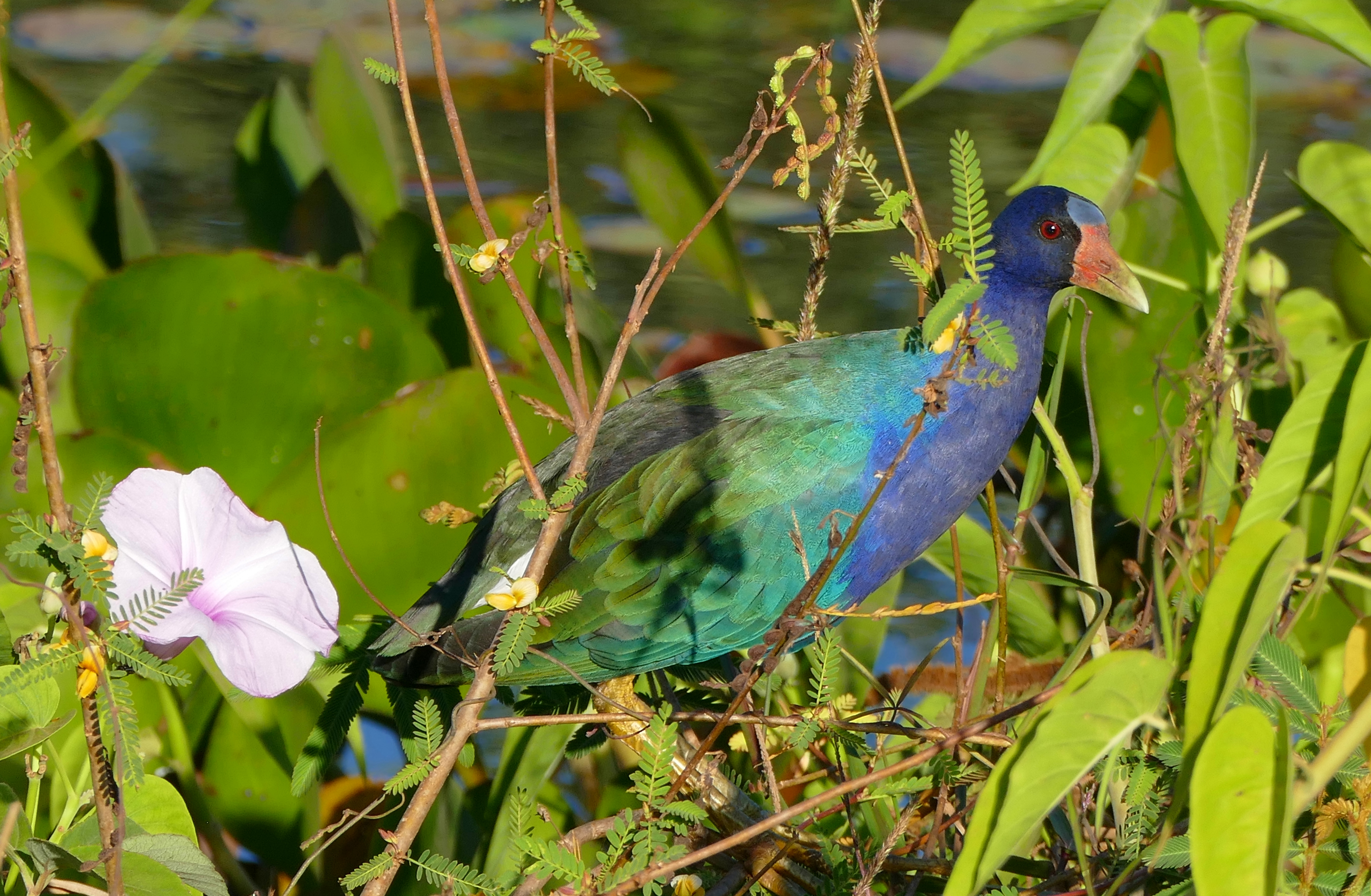 Transpantaneira, Poconé, Mato Grosso, BRAZIL